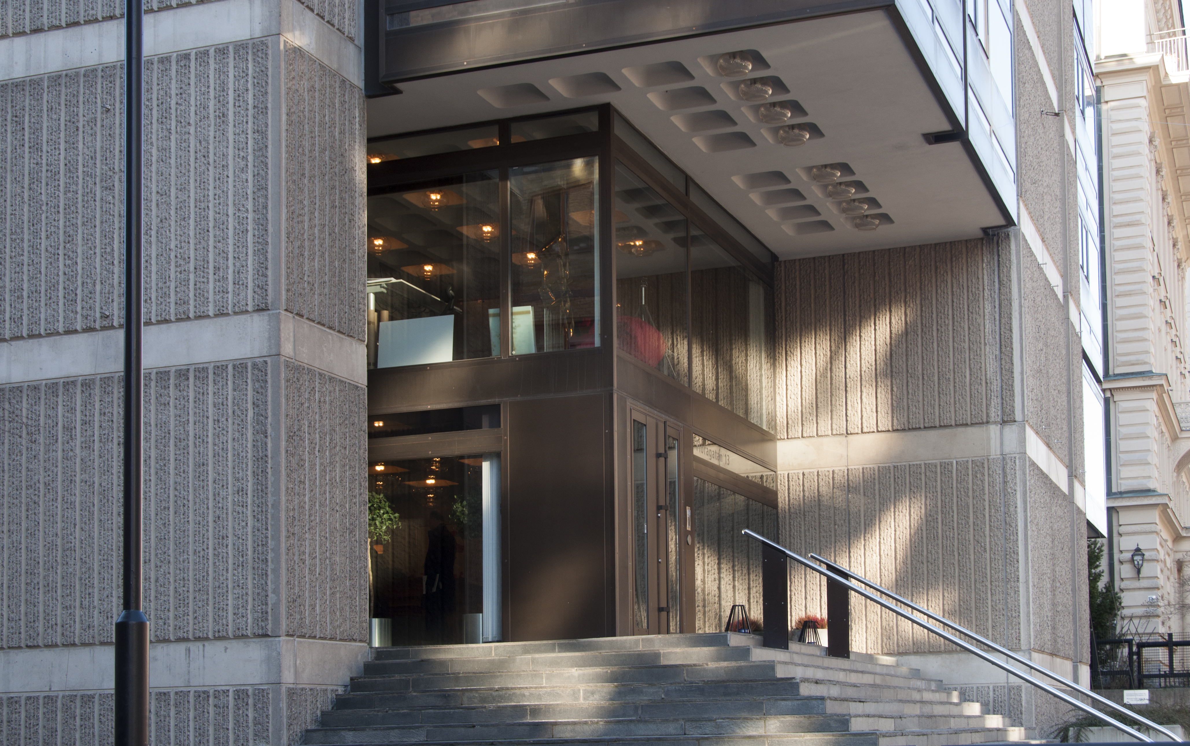 Granen 21, Floragatan 13, Nybyggnadsår 1970 - 1972, Jan Bočan - BETA Arkitektkontor Prag (Arkitekt) SIAB Svenska Industribyggen AB (Byggmästare) Tjeckoslovakiska Socialistiska Republikens Ambassad (Byggherre)